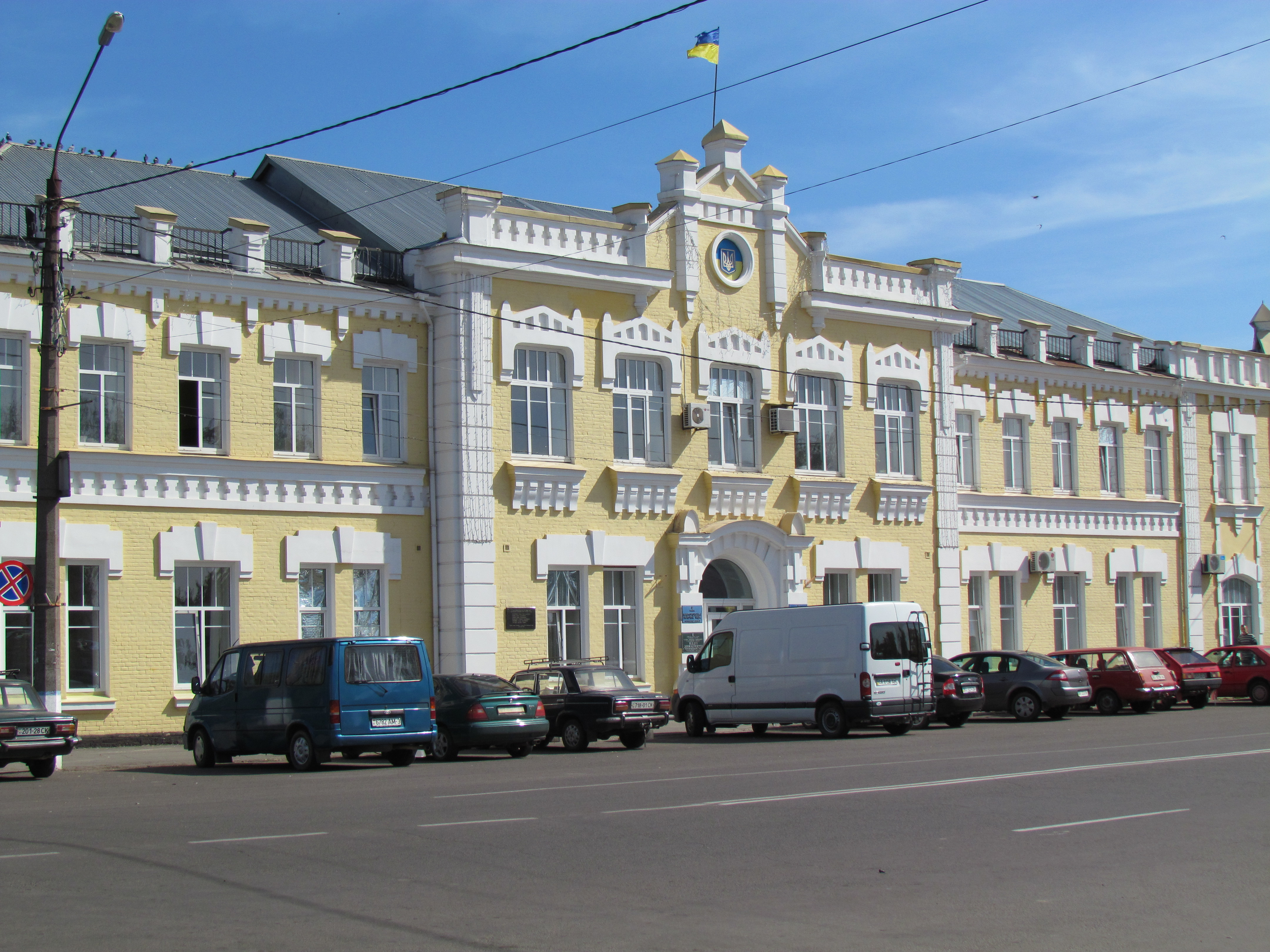 Будинок Миргородської міської управи